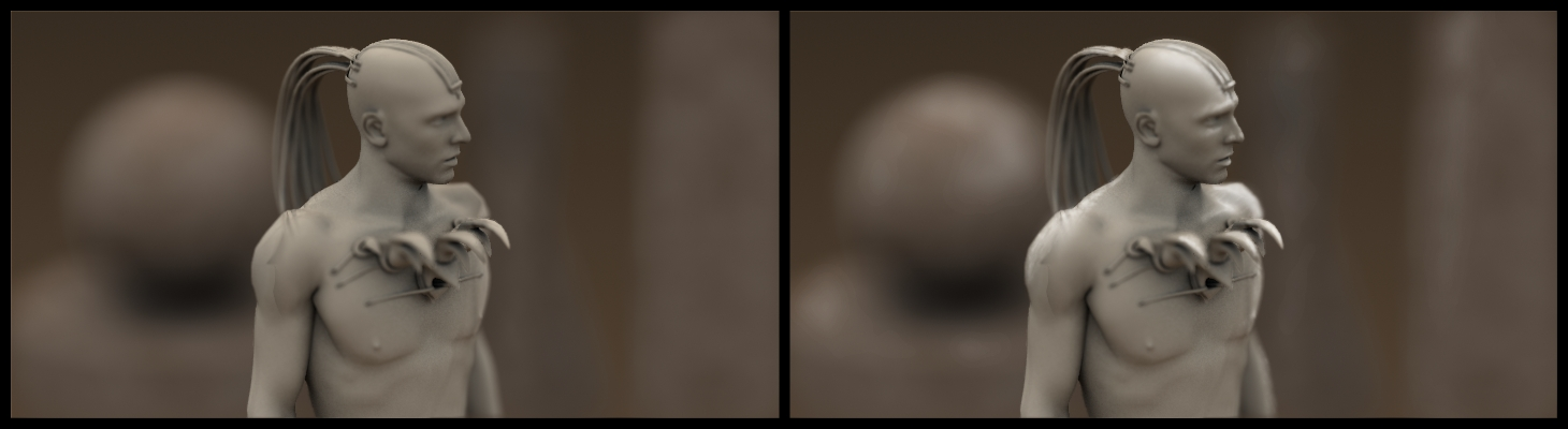 lummeggiatura e fotoritocco su immagine digitale 3D